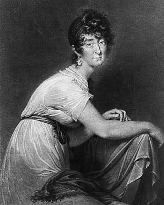 Baroness Fanny von Arnstein